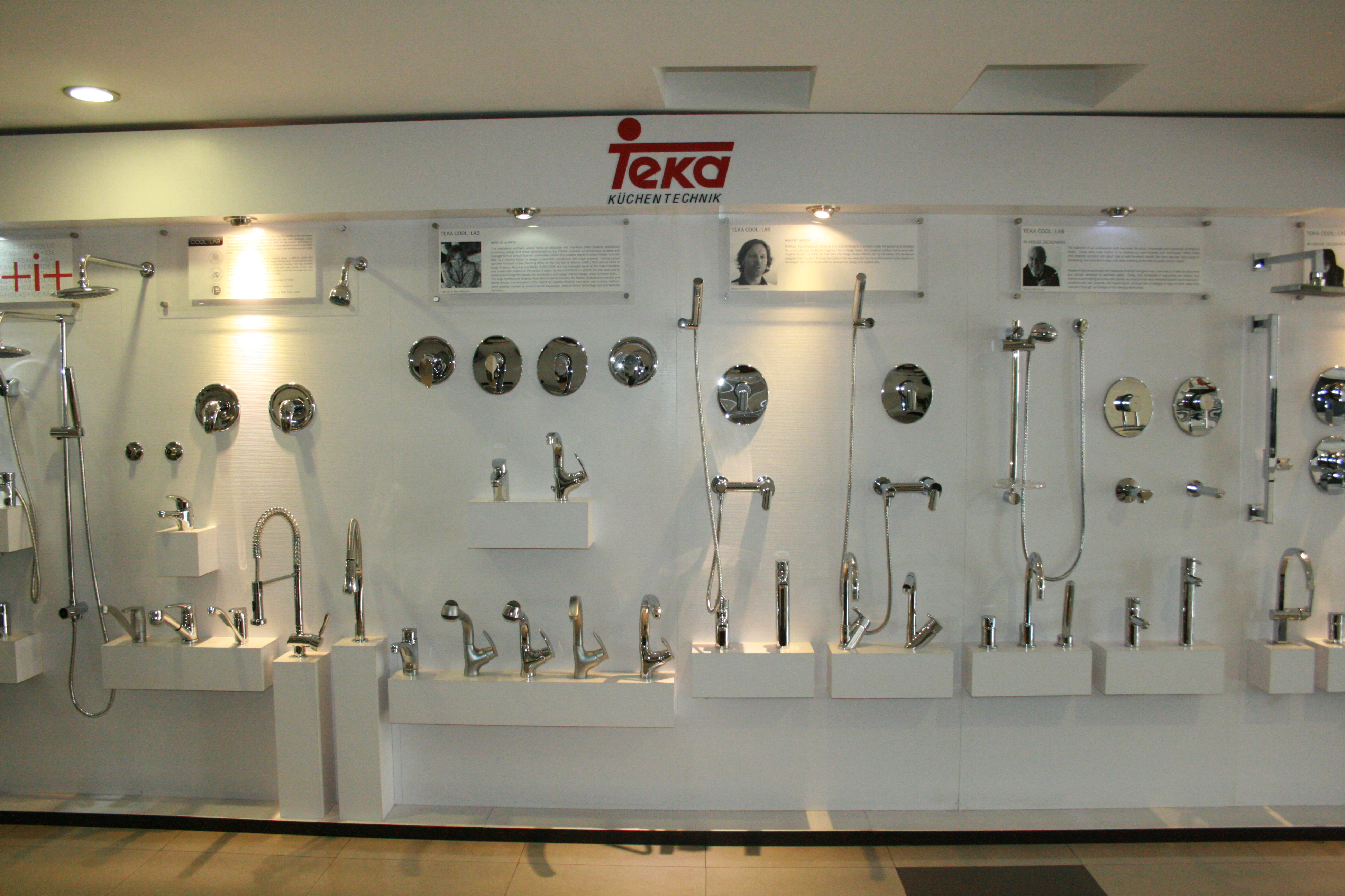 Grifería Teka en su showroom de México.